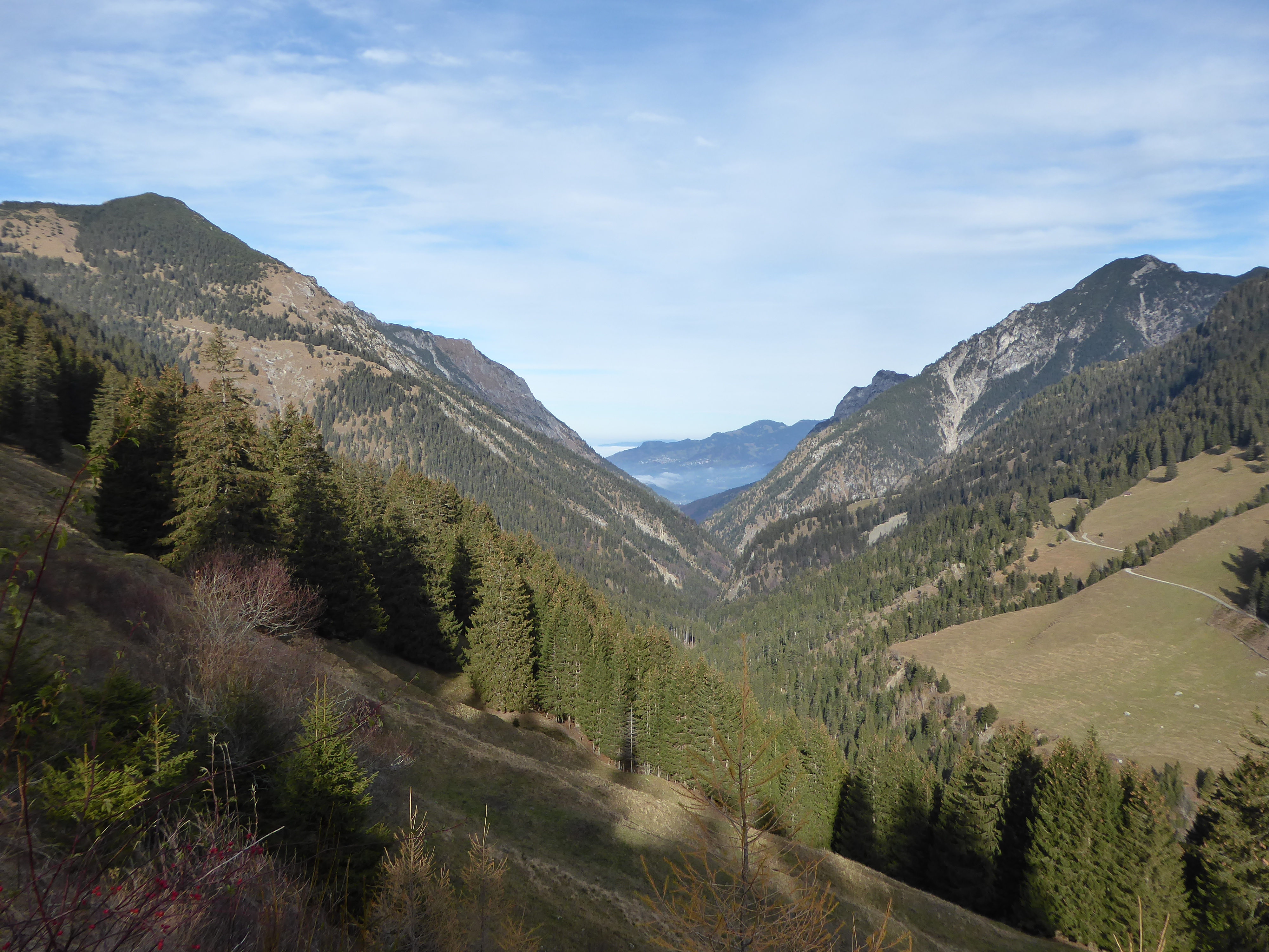 Blick vom Kulm FL auf das Saminatal